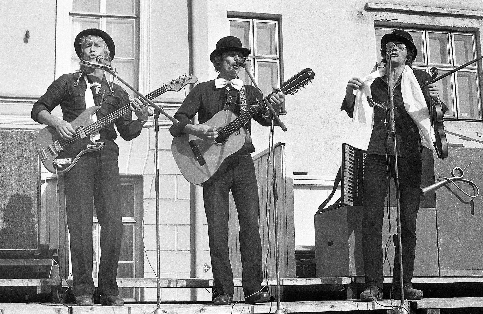 Ansambel Hampelmann.